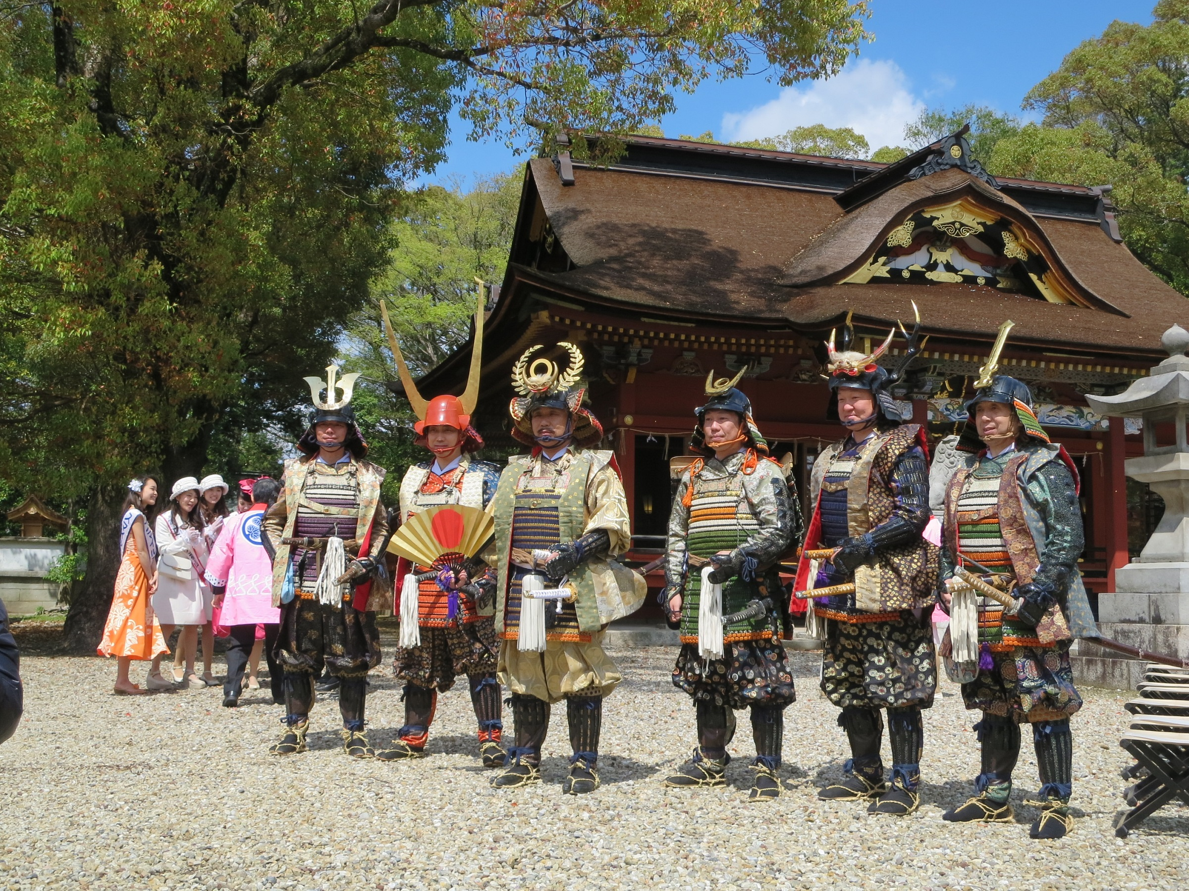 家康行列（愛知県岡崎市）